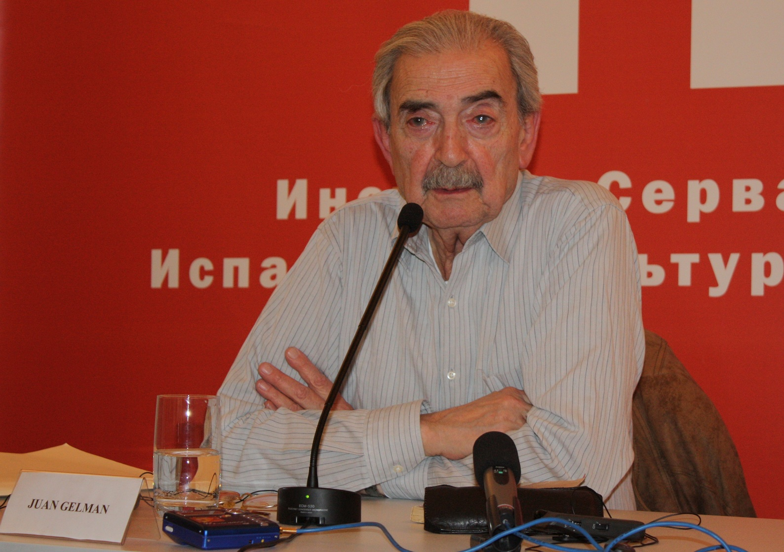 Хуан Хельман в Институте Сервантеса